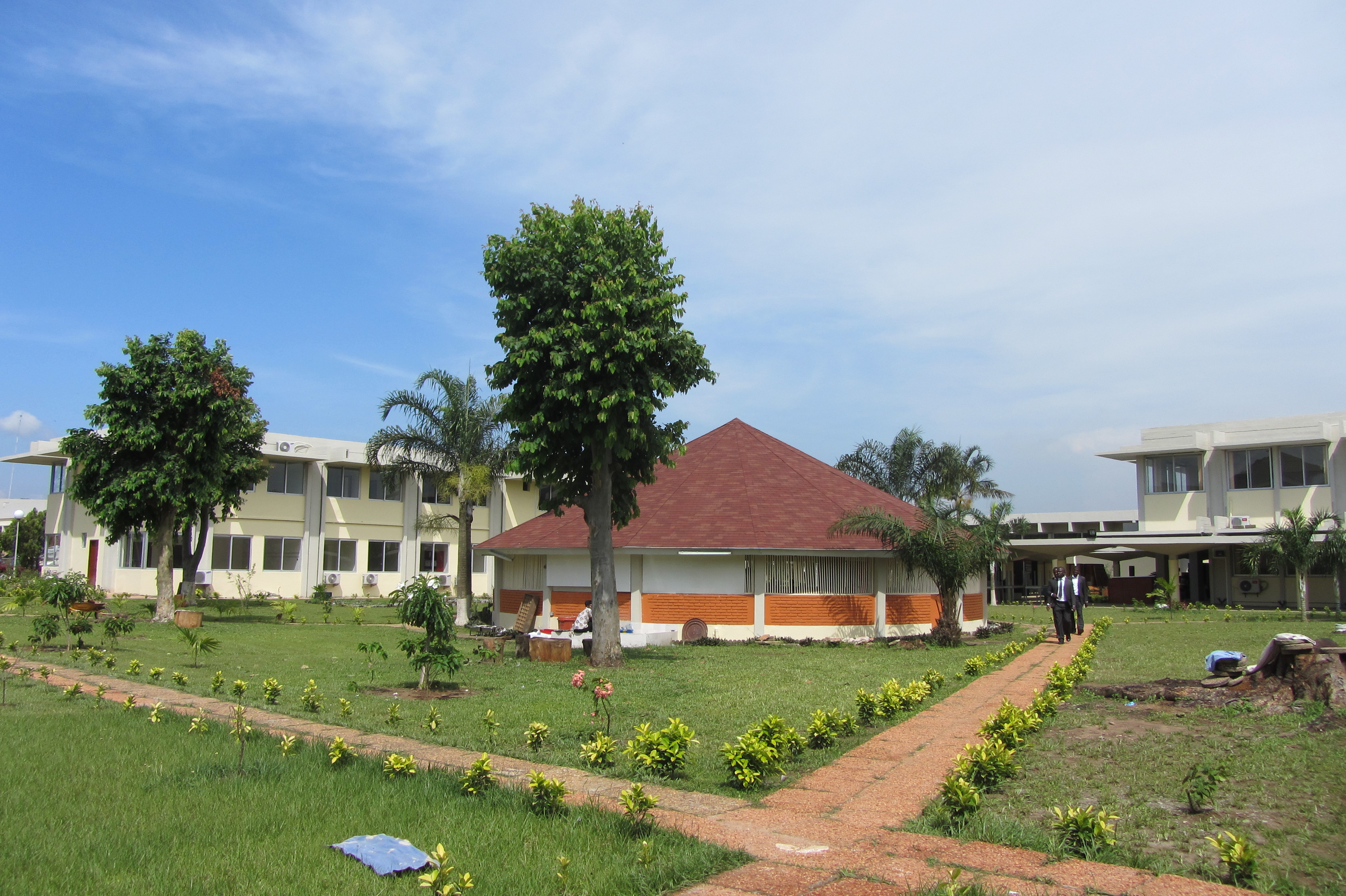 L'école normale supérieure d'Abidjan